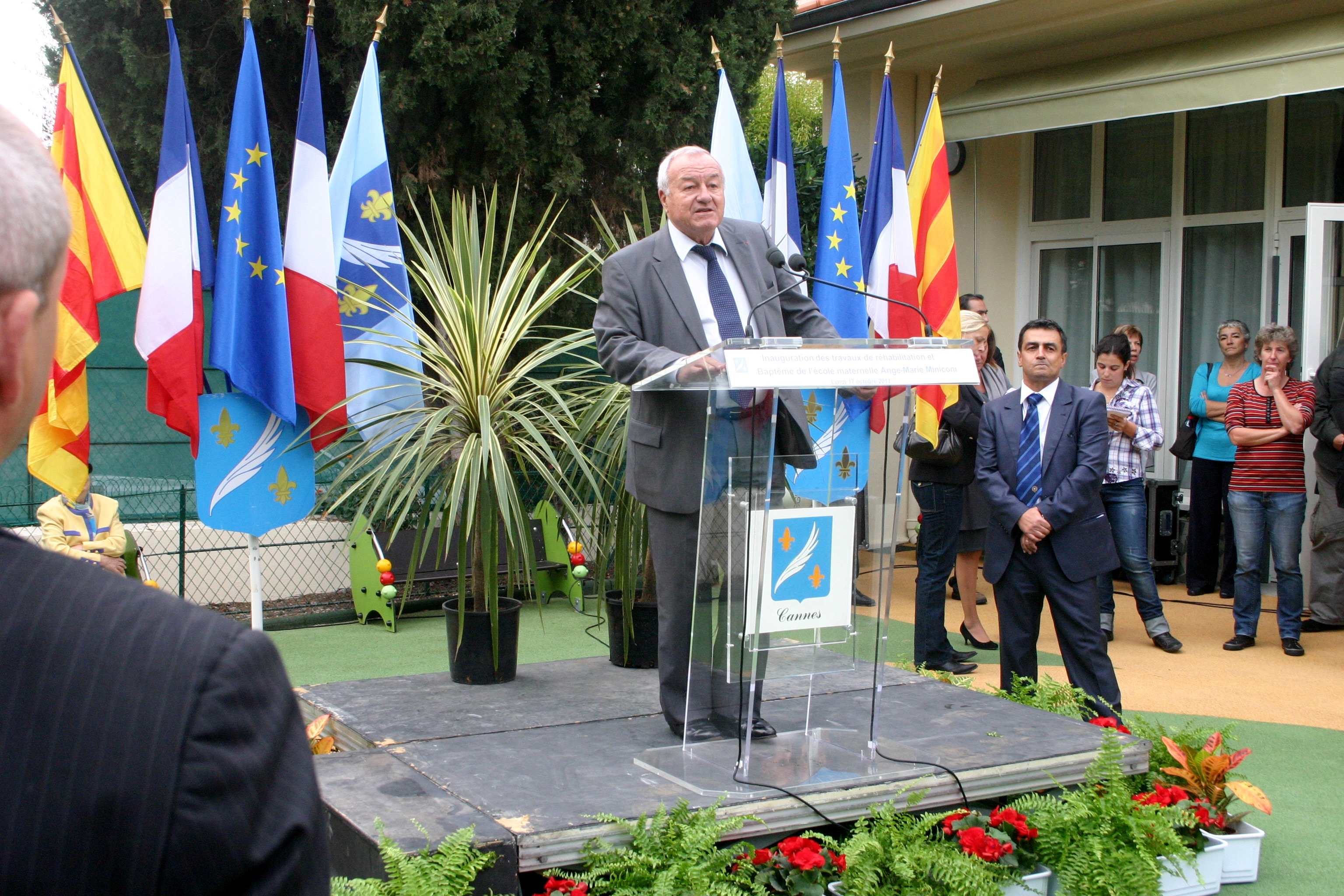 Monsieur Bernard BROCHAND, Député Maire de Cannes, lors de son élogieux discours. Inauguration de l'école Ange-Marie MINICONI, le 17 octobre 2011.